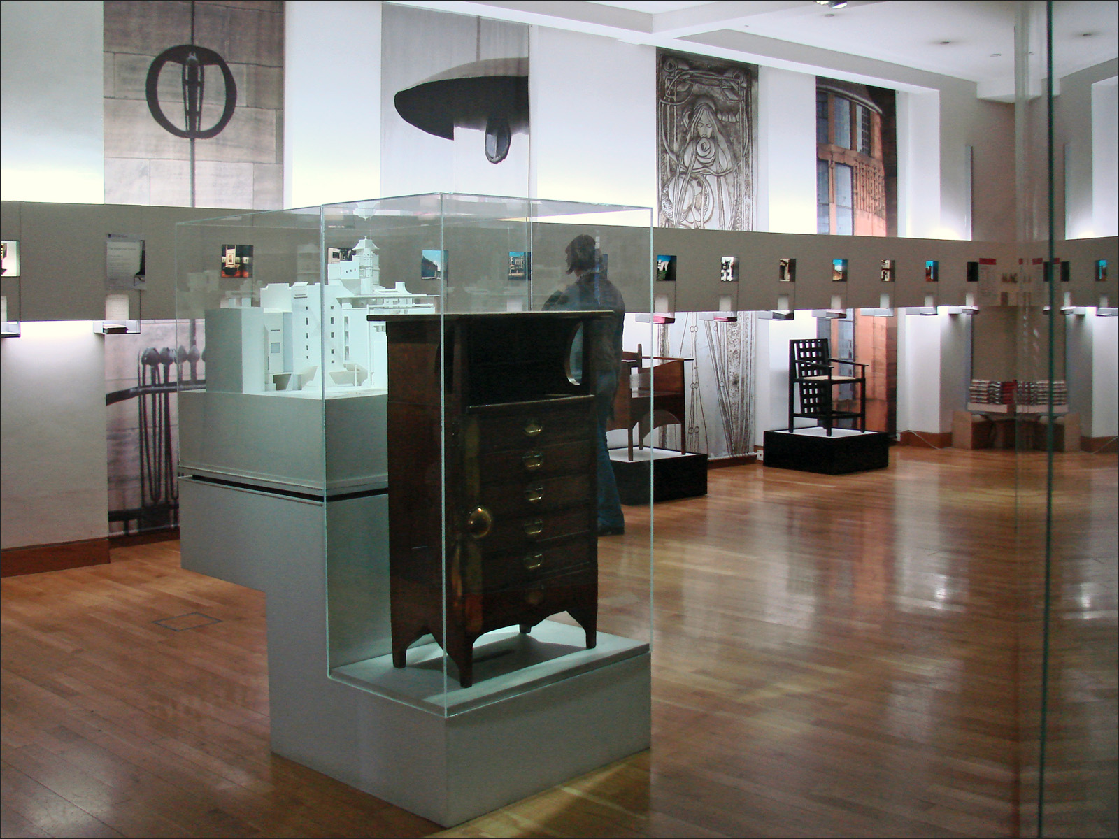 Une des salles du centre d'interprétation de l'oeuvre de C. R. Mackintosh et de M. Macdonald appelé "The Lighthouse" (ancien bâtiment conçu par Mackintosh pour le journal "Glasgow Herald"). Le centre présente des meubles, des documents, des dessins, des films et des photographies illustrant les travaux des deux artistes. Il précise le contexte historique, politique et artistique dans lequel ils ont vécu. Quelques dates : la Maison du Peuple à Bruxelles : V. Horta 1896-1899 Le bâtiment Secession à Vienne : J. Olbrich 1897-1898 Les stations de métro à Paris : H. Guimard 1898-1900 L'ecole d'art à Glasgow : C. R. Mackintosh 1896